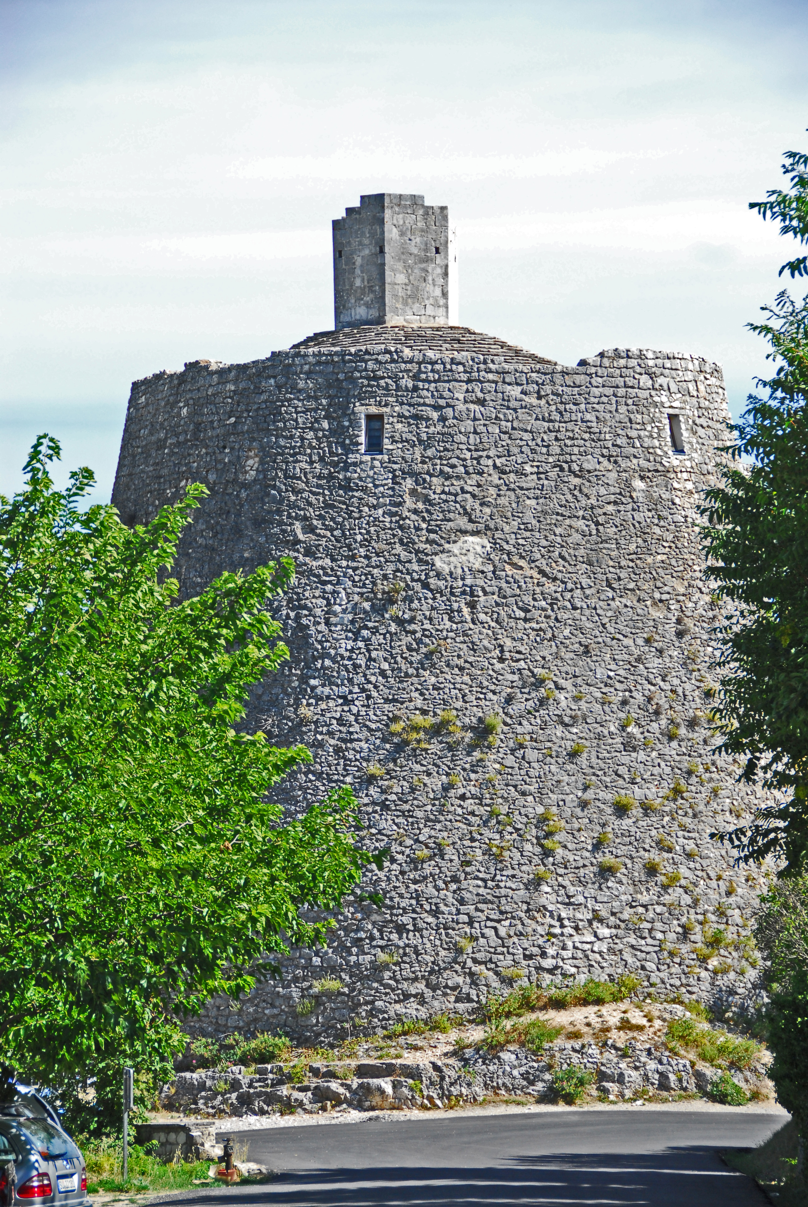 Chateau de Simiane-la-Rotonde, Donjon von W